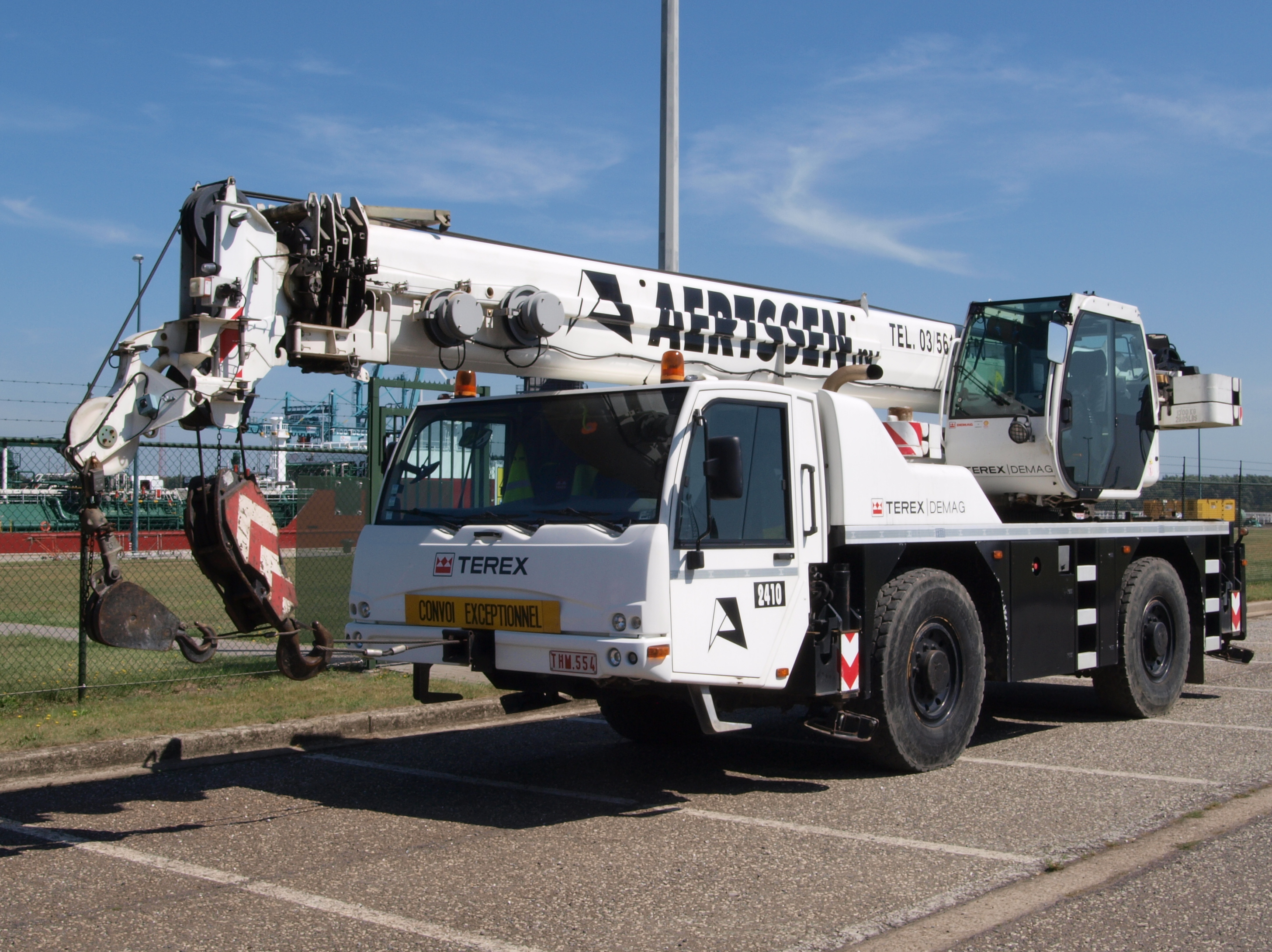 Terex Demag 2410